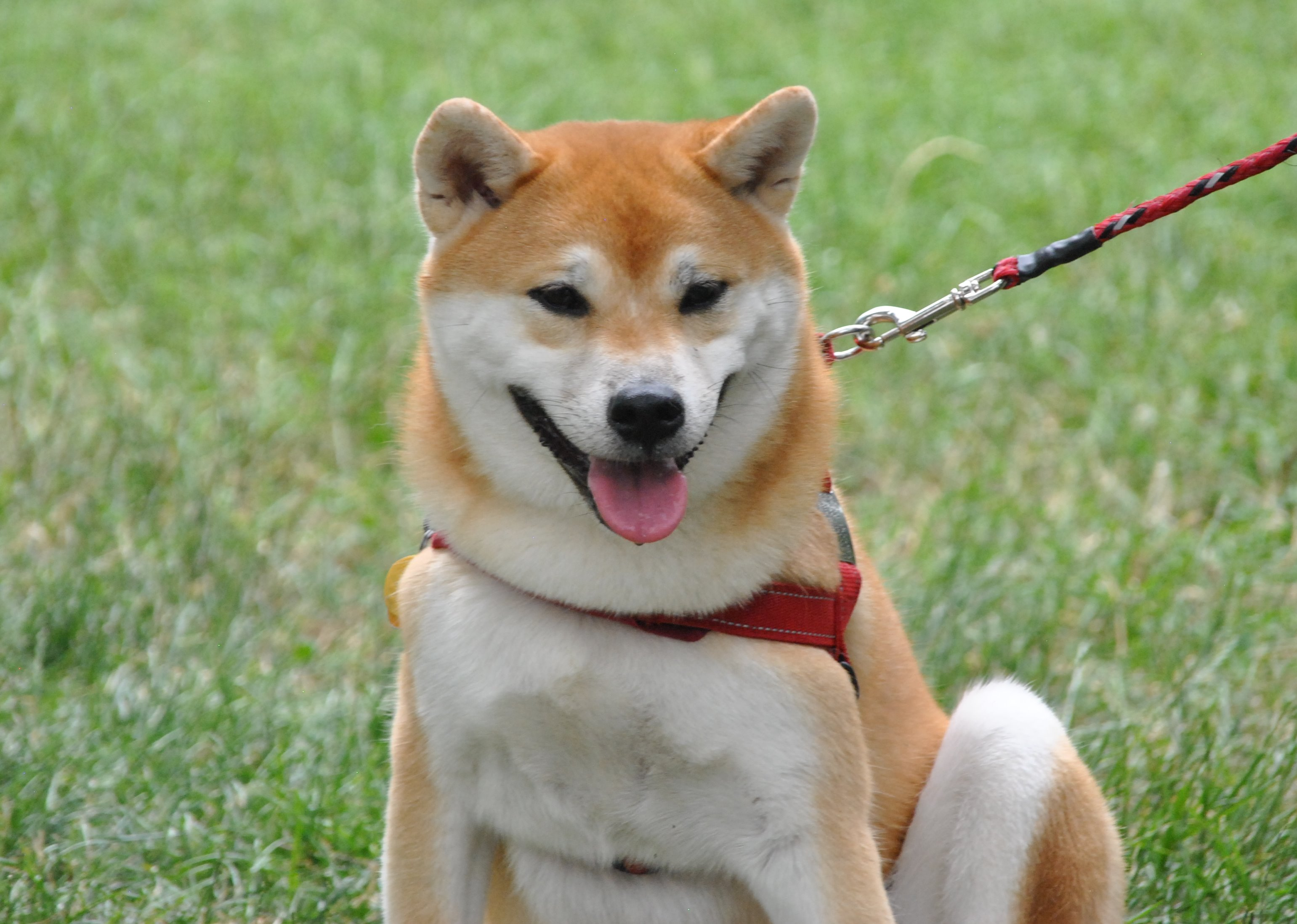 Shiba Inu